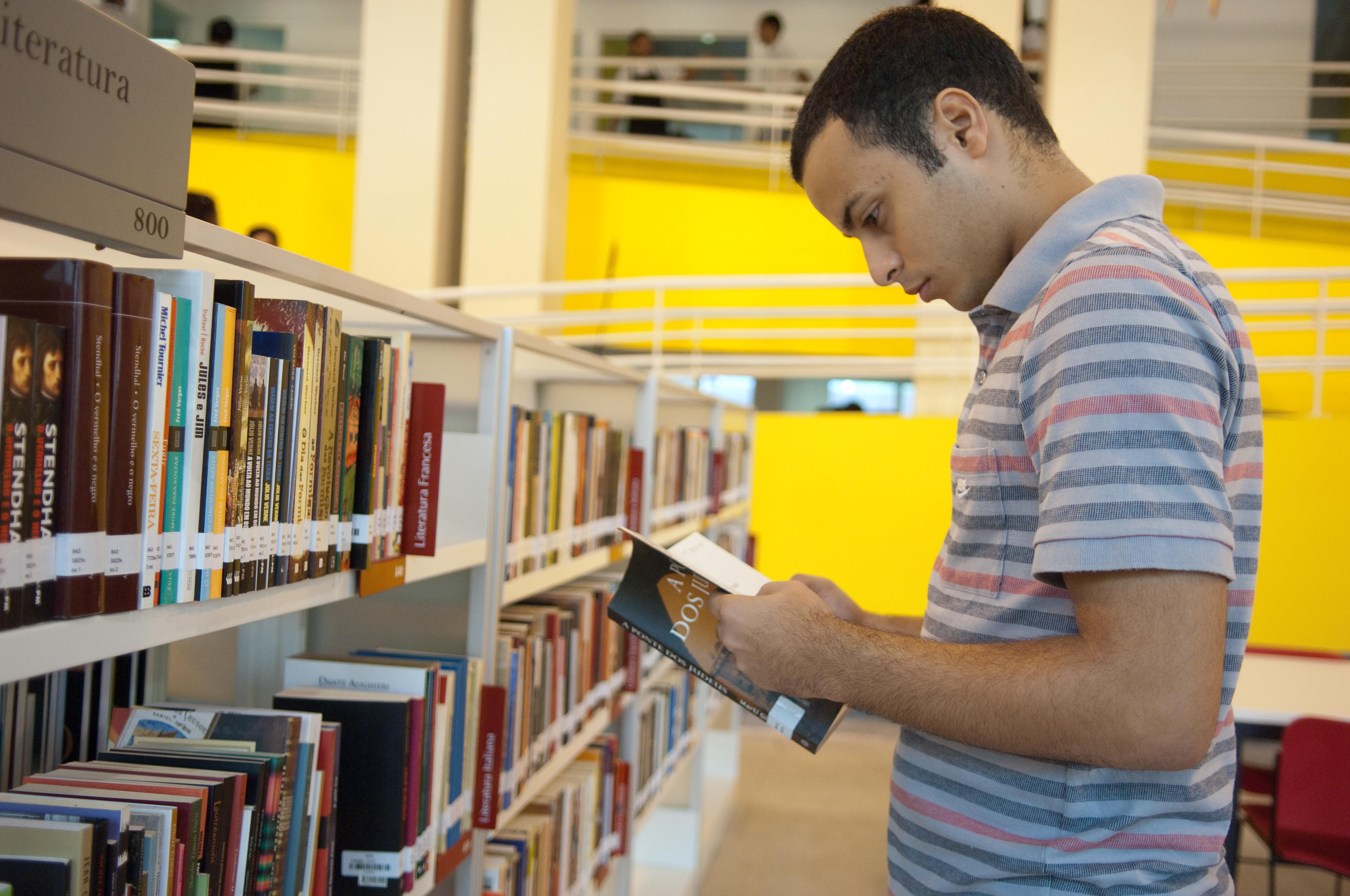 29/04/2010. Crédito: Pedro França/Minc. Brasil. Brasília-DF. Inauguração da Biblioteca Parque de Manguinhos - RJ